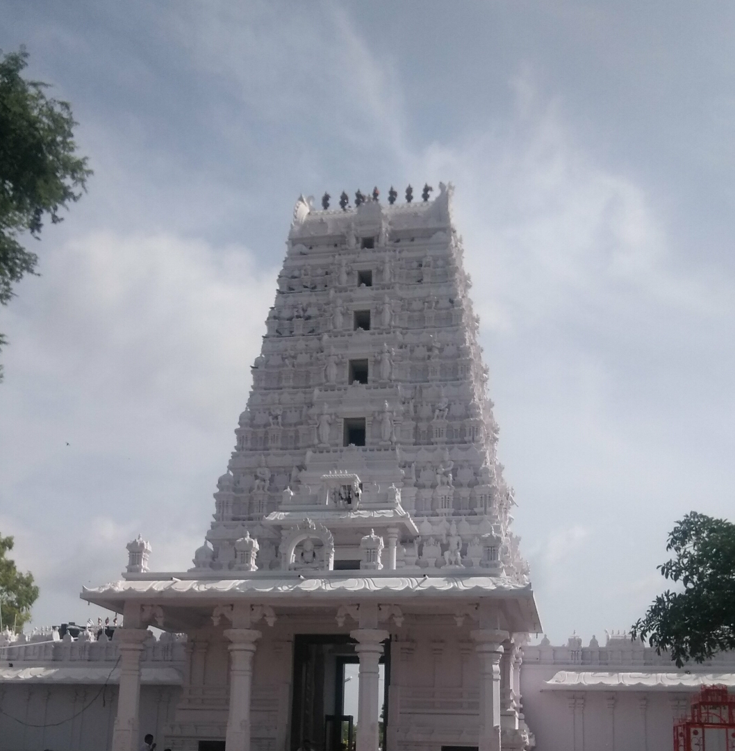 కర్మాన్ఘట్ ఆంజనేయస్వామి గుడి ఆలయ చరిత్ర: నిత్యం ఎంతోమంది భక్తులతో రద్దీగా ఉండే ఈ ఆలయానికి చాలానే చరిత్ర ఉంది.ఒక్కసారి చరిత్ర లోకి వెళ్ళి చూస్తే మనకు అర్థం అవుతుంది. ఈ ఆలయాన్ని కాకతీయులు పన్నెండవ శతాబ్దంలో కట్టించారు. కాకతీయుల వంశంలో చివరి రాజయిన ప్రతాపరుద్రుడు మరియు ఆయన సైన్యంతో ఇక్కడికి వేట కోసం వచ్చినప్పుడు ఆయన అలసిపోయి ఒక చెట్టు కింద నిద్రిస్తున్నపుడు ఒక్కసారిగా పెద్ద శబ్దంతో "రామా ......రామా..."అనే అరుపులు వినిపించాయి.అపుడు వెంటనే ఉలిక్కిపడి లేచిన ప్రతాపరుద్రుడు ఆ అరుపులు సమీపంలోని ఒక విగ్రహం నుండి వస్తున్నట్లుగా గమనించాడు.ఆ తరువాత ప్రతాపరుద్రుడు తిరిగి తన నగరమైన ఓరుగల్లుకి చేరుకున్నాక ఆ రోజు కలలో ఆంజనేయస్వామి దర్శనమై తనకు ఆ ప్రదేశం లో ఆలయం నిర్మించవలసిందిగా ఆదేశించాడు.అపుడు తక్షణమే ప్రతాపరుద్రుడు ఆంజనేయస్వామి ఆలయాన్ని నిర్మించాడు. ఇదిలా ఉండగా 1687 లో గోల్కొండ పైకి దండయాత్ర చేసిన మెుఘల్ చక్రవర్తి ఐన జౌరంగజేబు హిందూ ఆలయాలని ధ్వంసం చేసే క్రమంలో ఈ ఆలయంలోని ఆంజనేయస్వామి విగ్రహం వద్దకి వచ్చి దానిపై కి గునపంని ఎత్తగానే 'కర్ మాన్ ఘట్ ' అనే భీకరమైన అరుపు అతనికి వినపడింది.ఇప్పుడు మనం పిలుస్తున్న కర్మాన్ఘట్ అనేది అప్పటినుండే వాడుకలోకి వచ్చింది. ఇంతటి చరిత్రని కలిగి ఉన్న ఈ ఆలయం ఇప్పుడు నిత్యం ఎంతోమంది భక్తులతో రద్దీగా ఉంటుంది. ఆంజనేయస్వామి పుట్టినరోజున అంటే హనుమాన్ జయంతి రోజున ఇక్కడి పూజారులు ఘనంగా ప్రత్యేక పూజలు నిర్వహిస్తారు .కొన్ని ప్రత్యేక రోజుల్లో అన్నదానం కార్యక్రమాన్ని కూడా నిర్వహిస్తారు. Karmanghat Temple Arch 18-1-15/4W, Inner Ring Rd, Sai Ram Nagar Colony, Champapet, Hyderabad, Telangana 500079 099084 96399 kakathiya's #Prathaparudra. karmanghat.#Hanumantemple. adithyapakide.